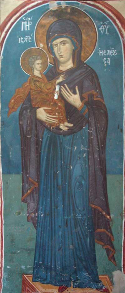 ИСУС ХРИСТОС /ДЕИЗИС, црква Воведение Богородичино / Св.Спас /,с. Кучевиште, 14 век, темпера на платно, шир. 79 см.вис. 229 см.